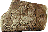 Разная каменная плітка з выявай льва з Ваўкавыска (Раскопкі Я.Г. Звяруга; Нацыянальны мастацкі музей Беларусі, Мінск)